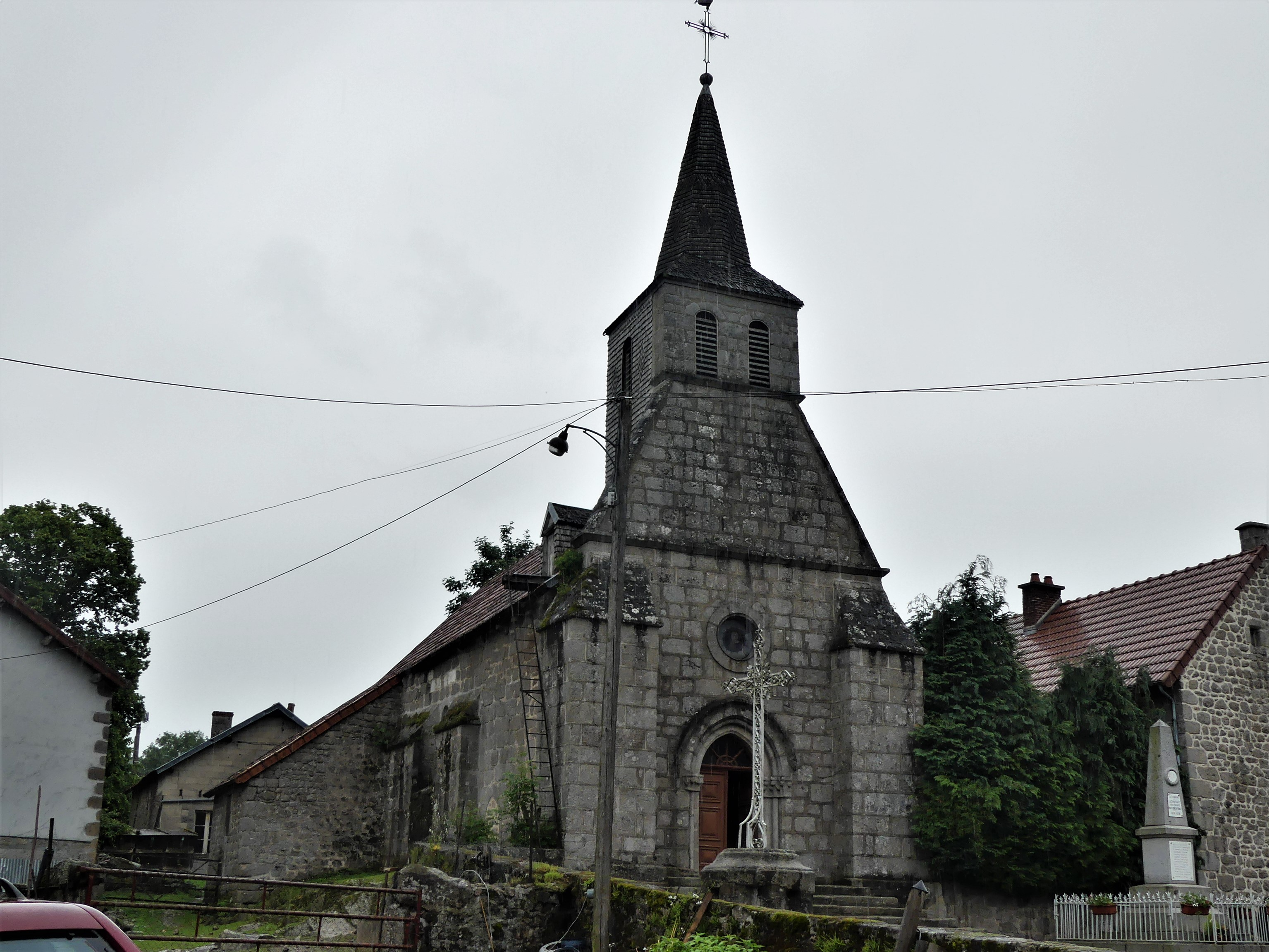 L'église de La Chaussade, Creuse, France.